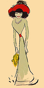 Polaire vue SEM